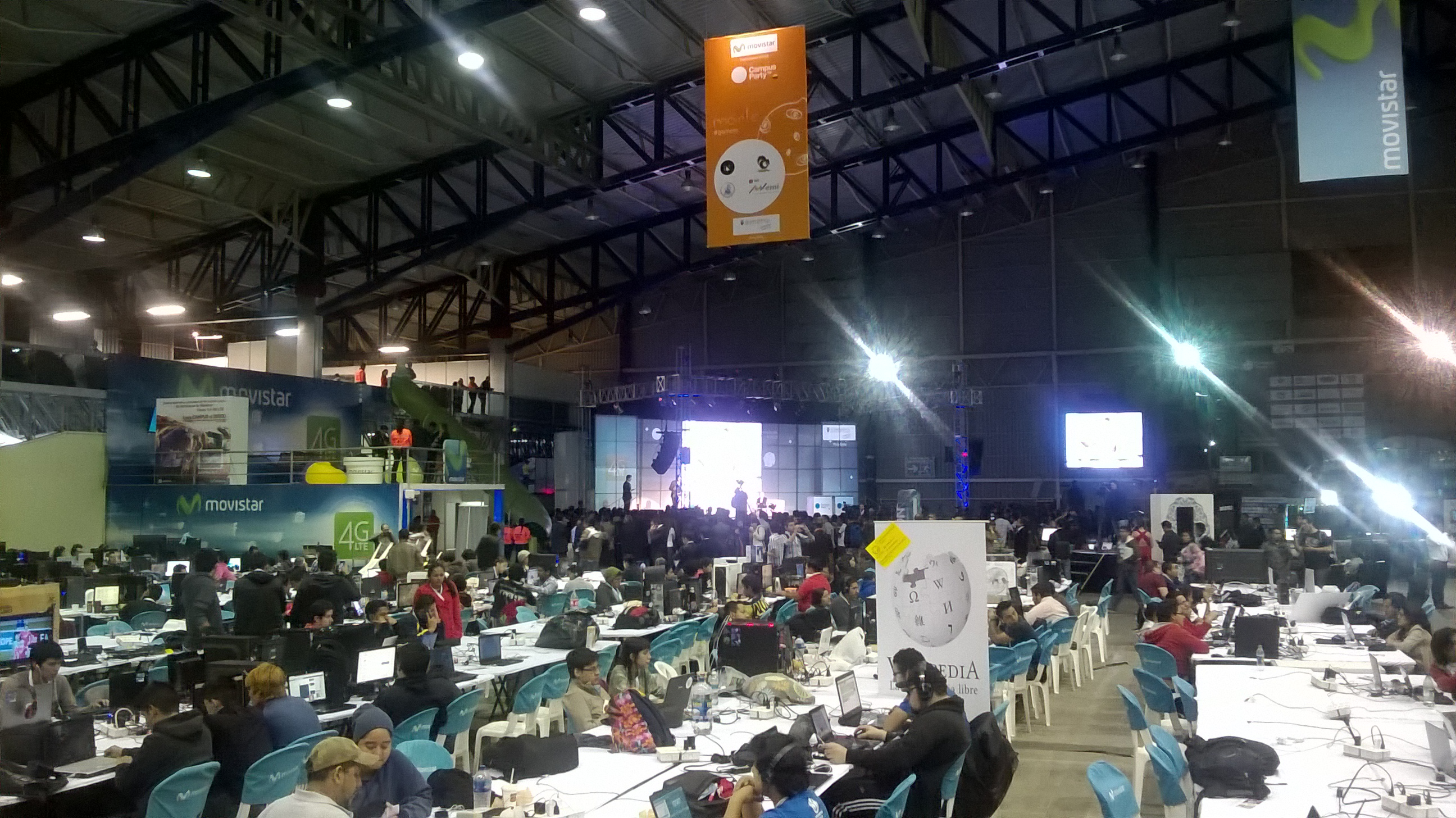 Imagen de la inauguración del Campus Party Ecuador 5